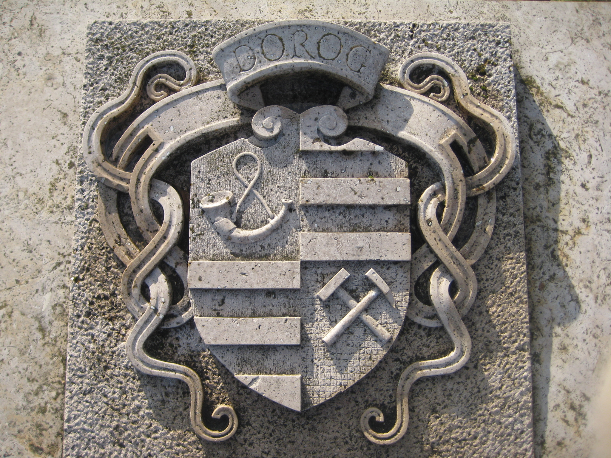 Dorogi Hűségnyilatkozat emlékmű első kép.